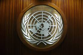 Las ramas de olivo simbolizan la paz. El mapa del mundo representa el área de interés de las Naciones Unidas para el logro de su propósito principal, paz y seguridad.